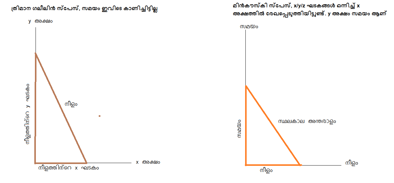 ഗലീലിയൻ സ്പേസും മിൻകൗസ്കി സ്പേസും താരതമ്യപ്പെടുത്തിയിരിയ്ക്കുന്നു